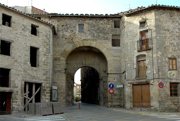 Santa Coloma de Queralt (Conca de Barberà). Un dels portals de la muralla